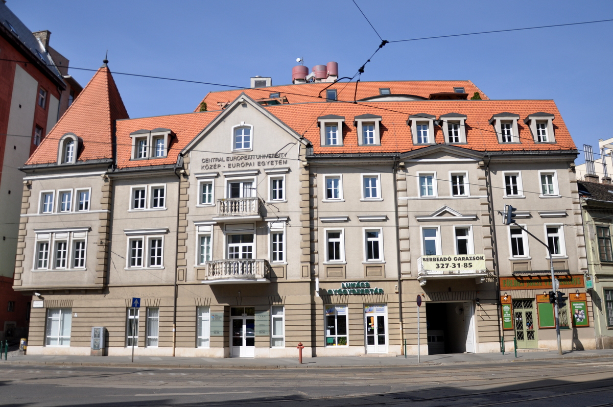 Central European University Business School, Frankel Leó utca 30-34, Budapest, Hungary